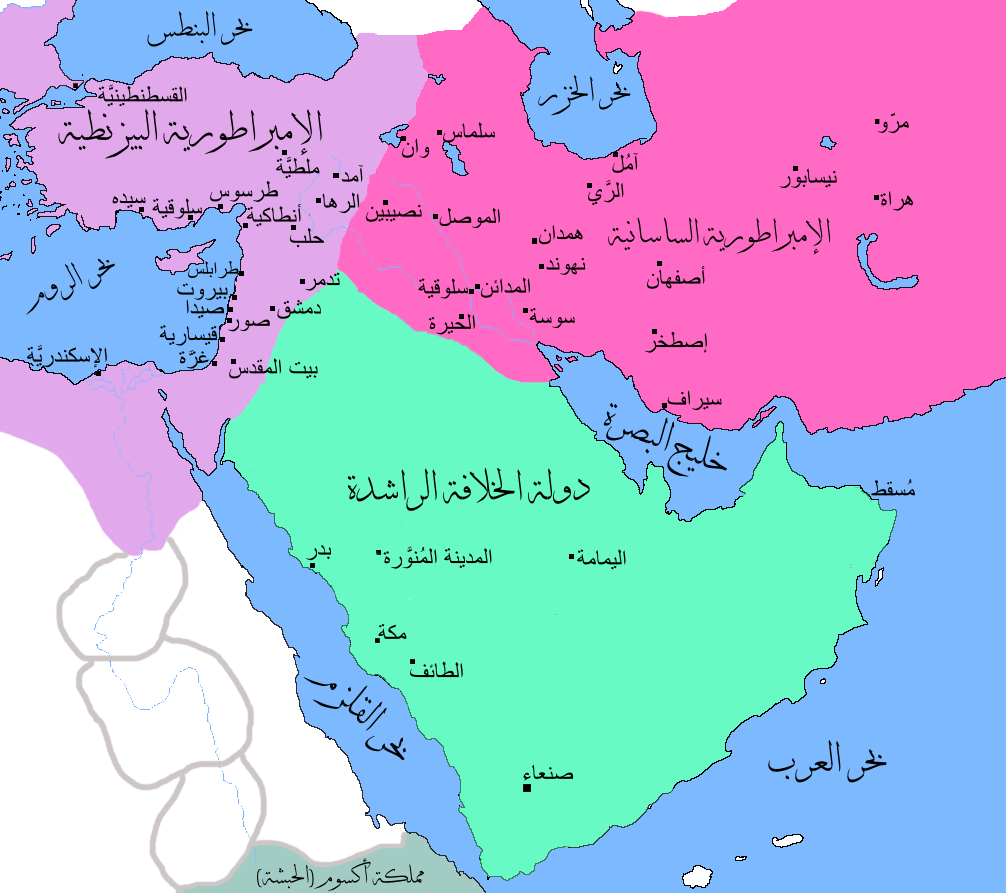 خارِطة تُظهر حُدود دولة الخِلافة الرَّاشدة والإمبراطوريتين الفارسيَّة الساسانيَّة والروميَّة البيزنطيَّة.